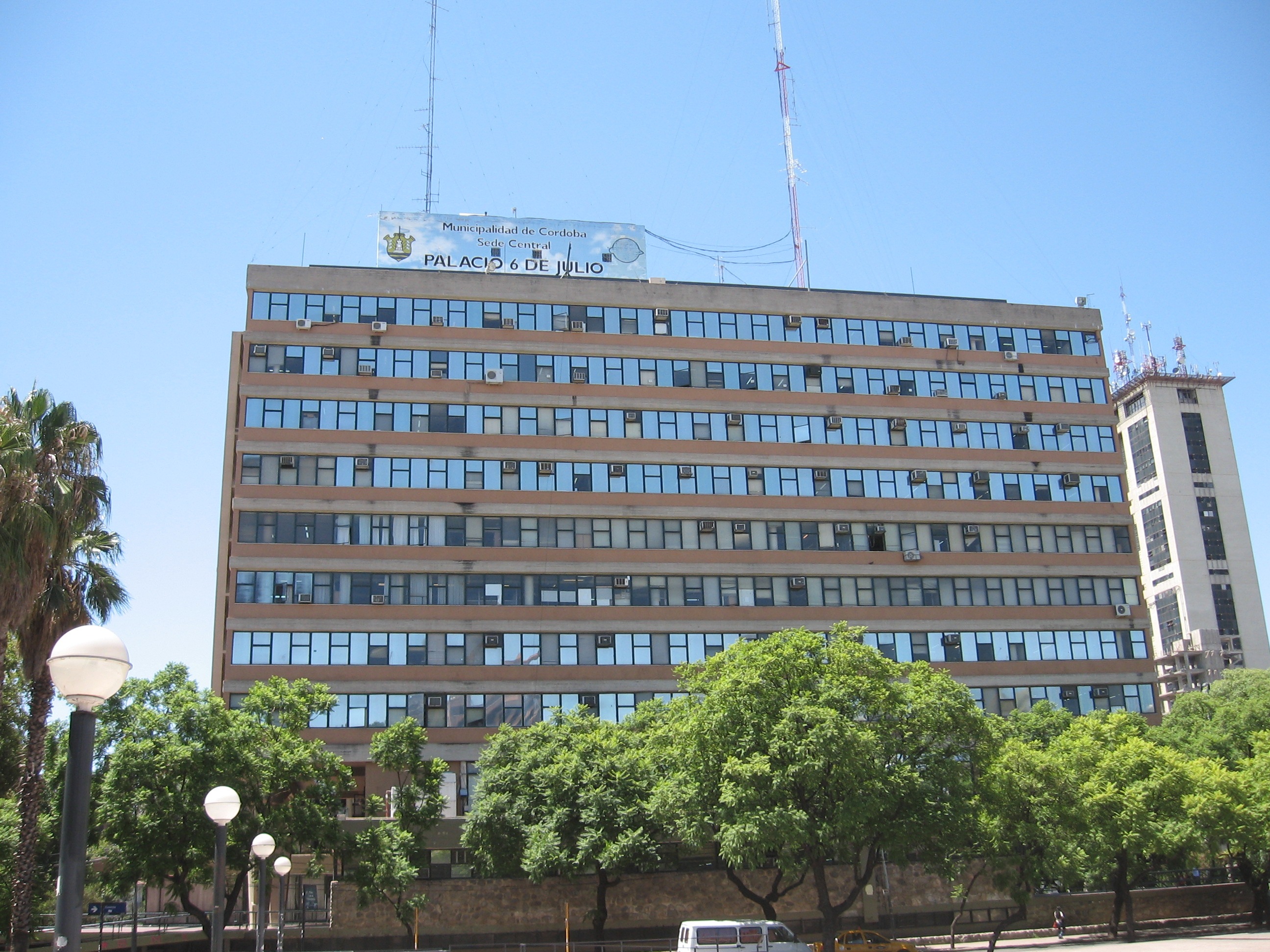 Palacio Municipal de la ciudad argentina de Córdoba